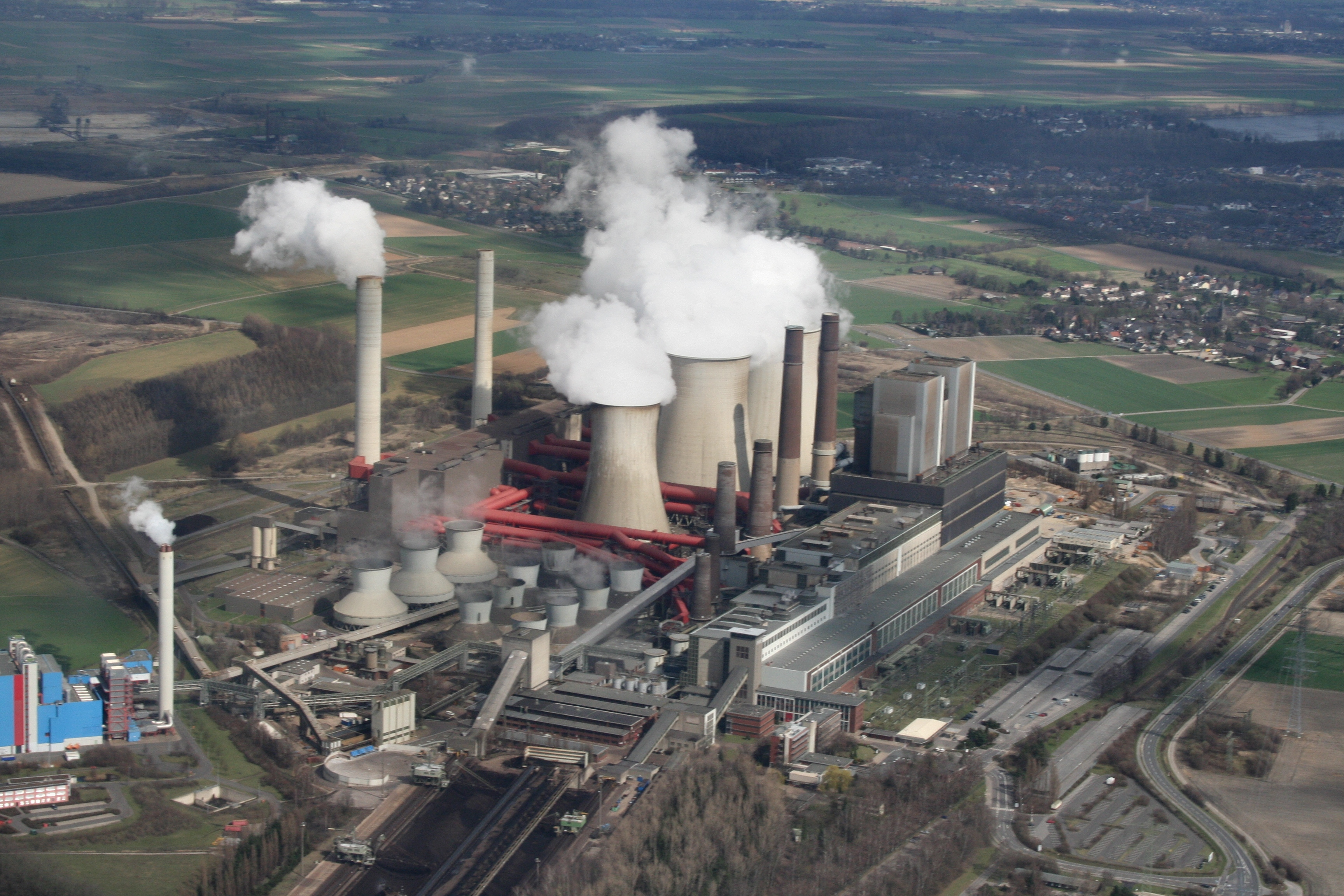 Kraftwerk Weisweiler aus der Luft von Westen aus